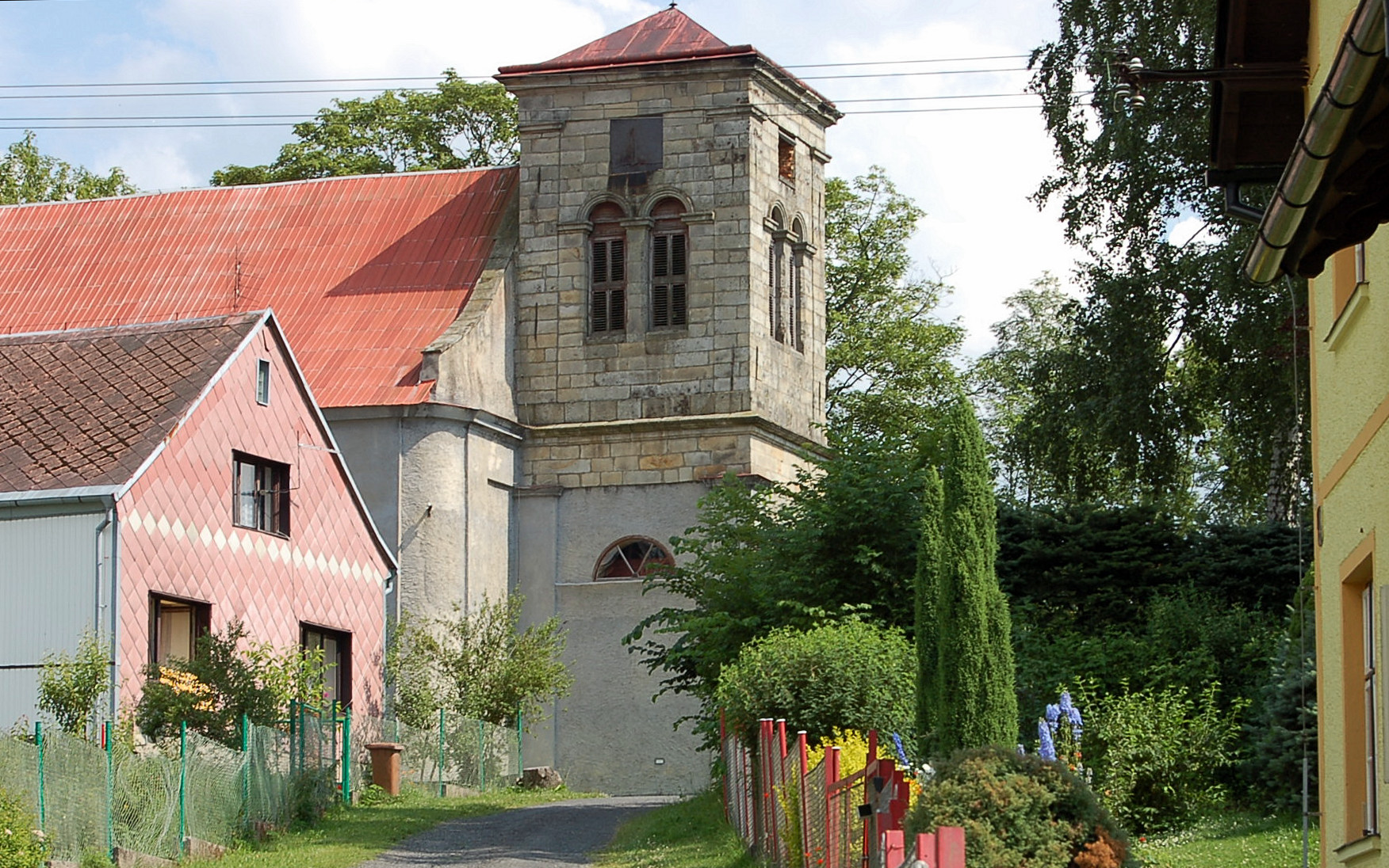 Halže - Kirche